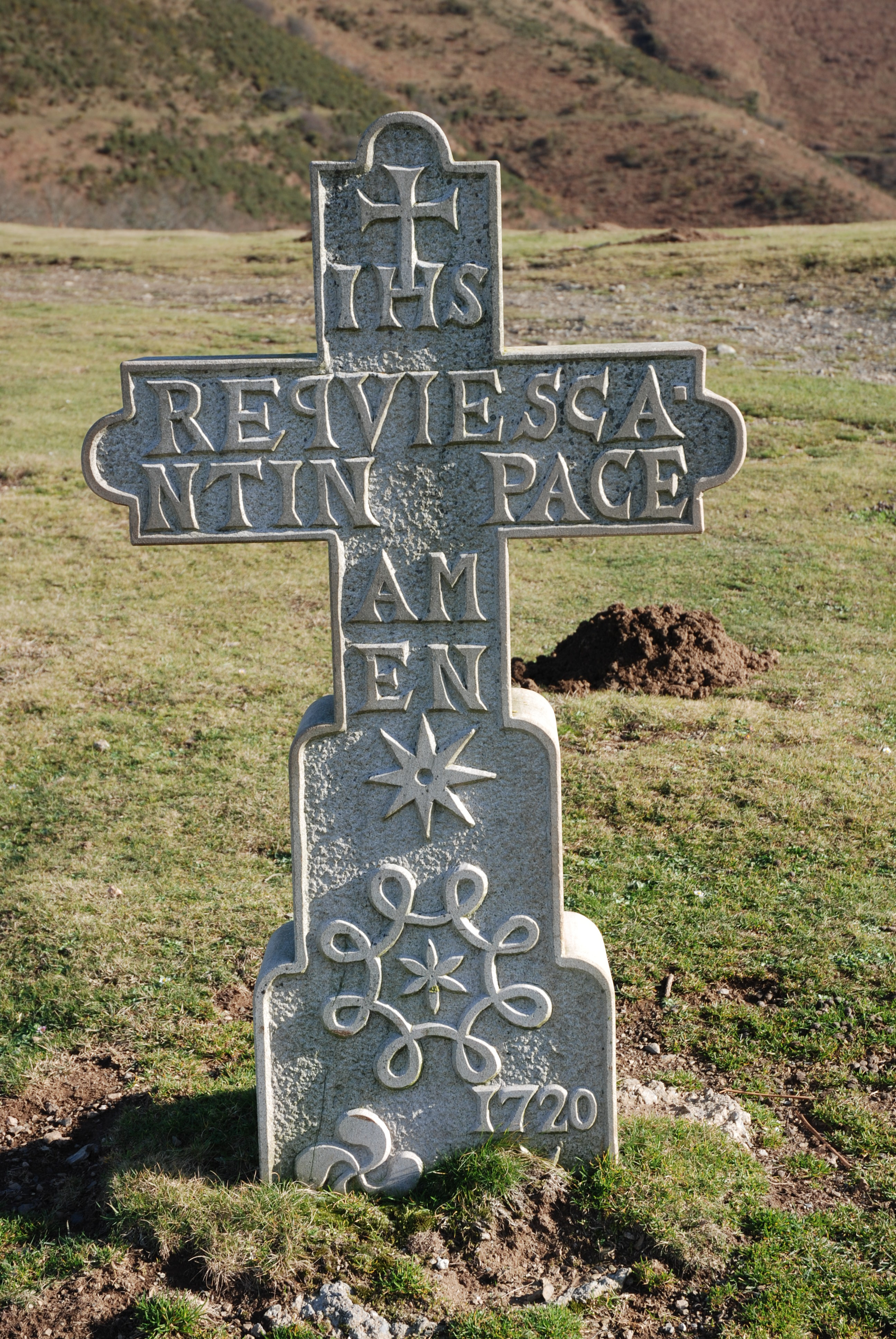 Ainhoa, croix recto de